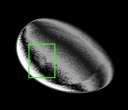 algse pildi allikas: NASA / JPL-Caltech / Space Science Institute - töödeldud pilt Methonest millel nähtav ringjas struktuur.